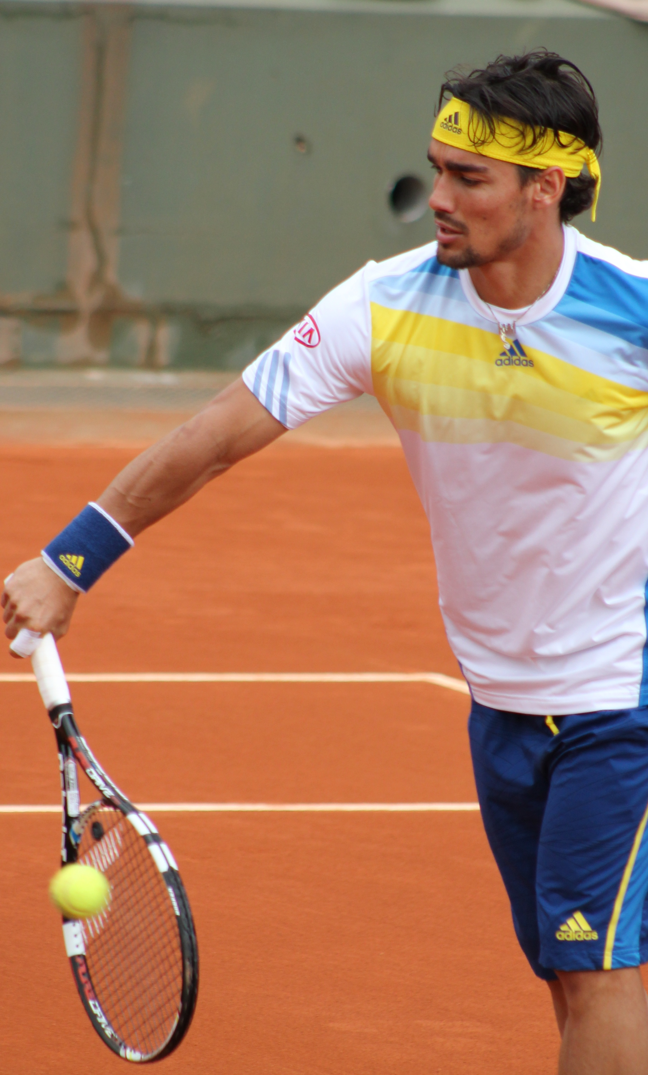 Fognini RG13 (8)